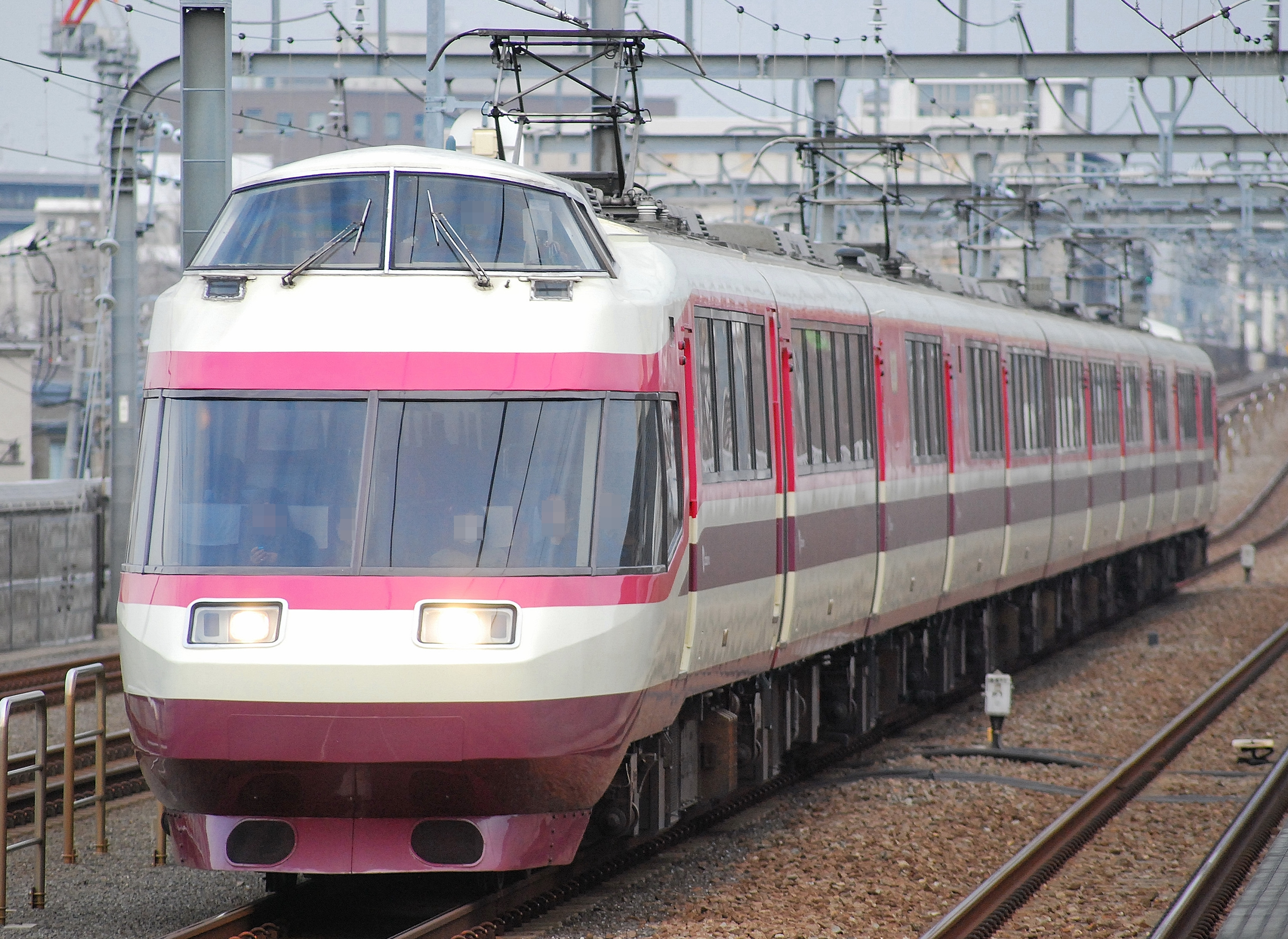 祖師ヶ谷大蔵駅を通過する小田急10000系